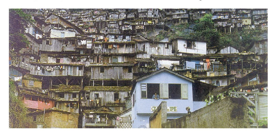 6. Irudia: XIX. mendearen bukaeran gizarteko baztertuenen zapalkuntza zuritzeko erabili zen darwinismoa.